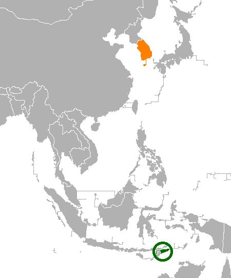 Localization of East Timor and South Korea